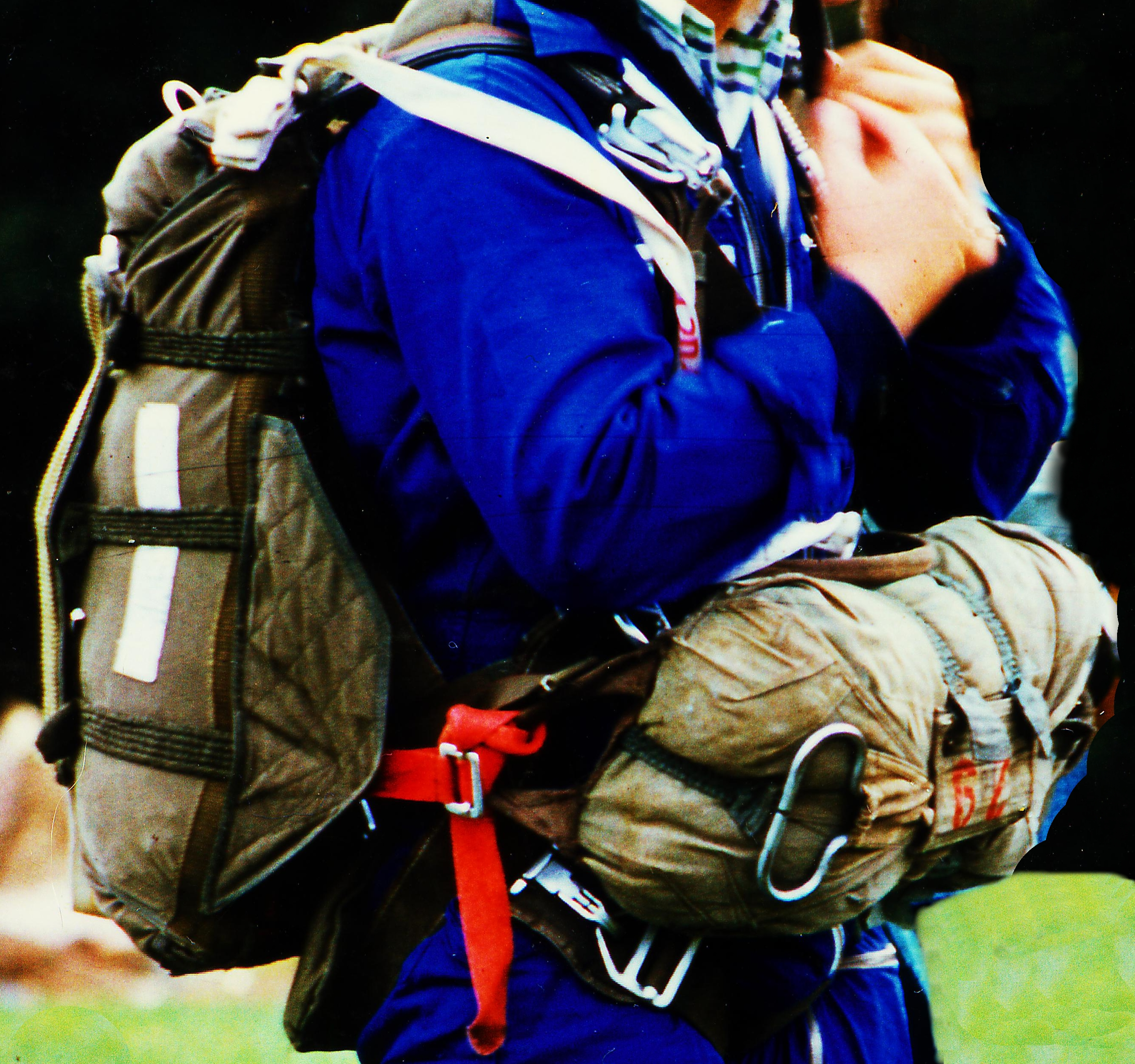 Reserveschirm mit Griff (vorne am Bauch), Aufziehleine auf rechter Schulter